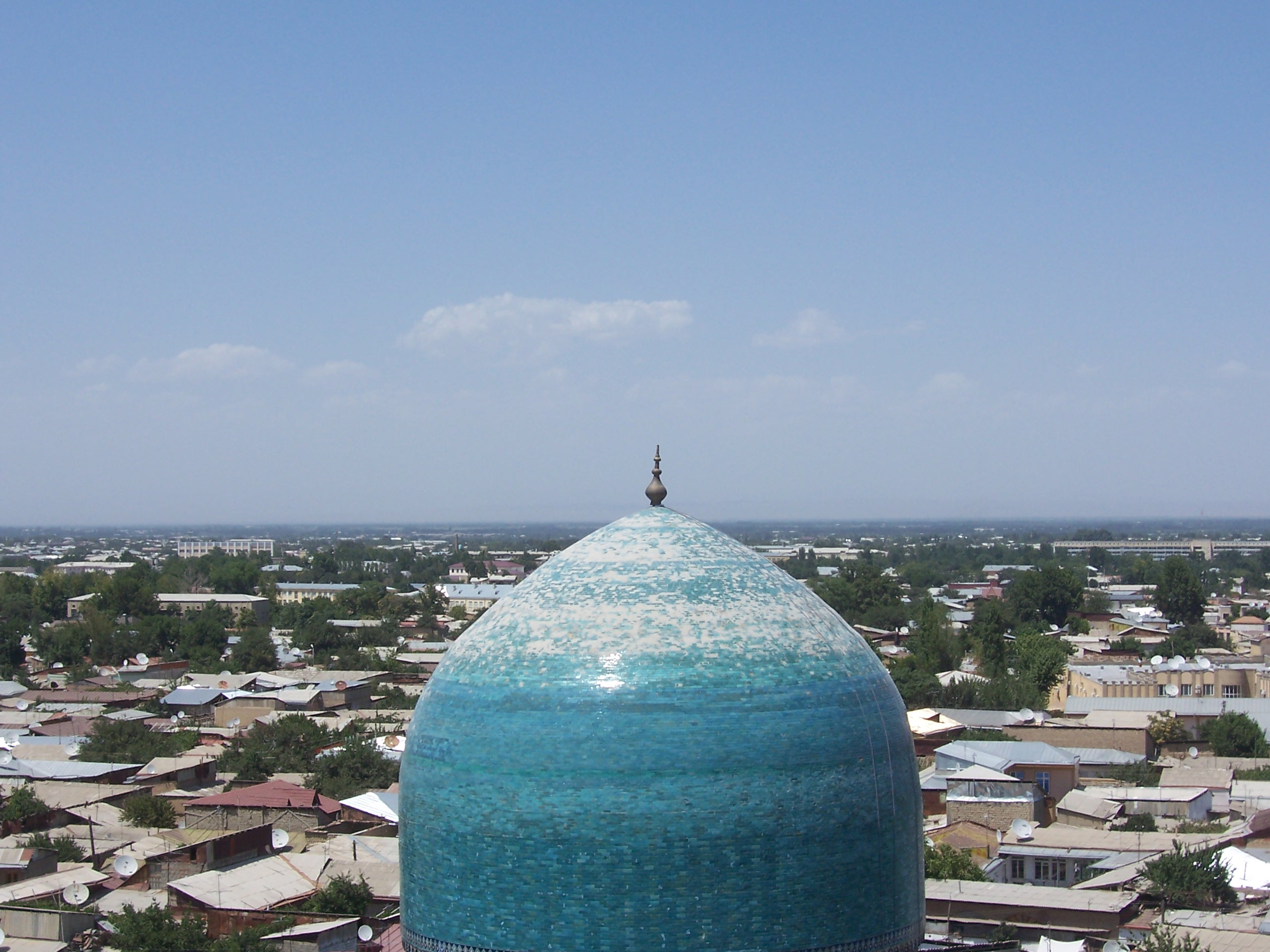 Samarcande vue d'un minaret du Registan.